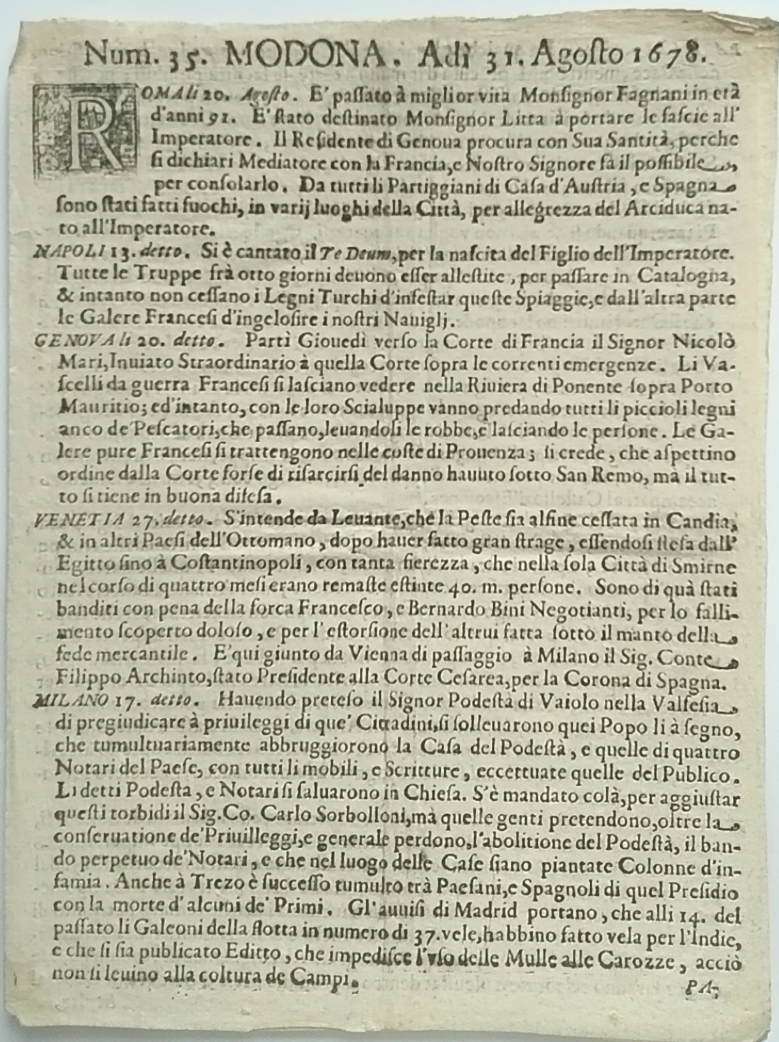 Gazzetta Modona n. 35 del 31 Agosto 1678